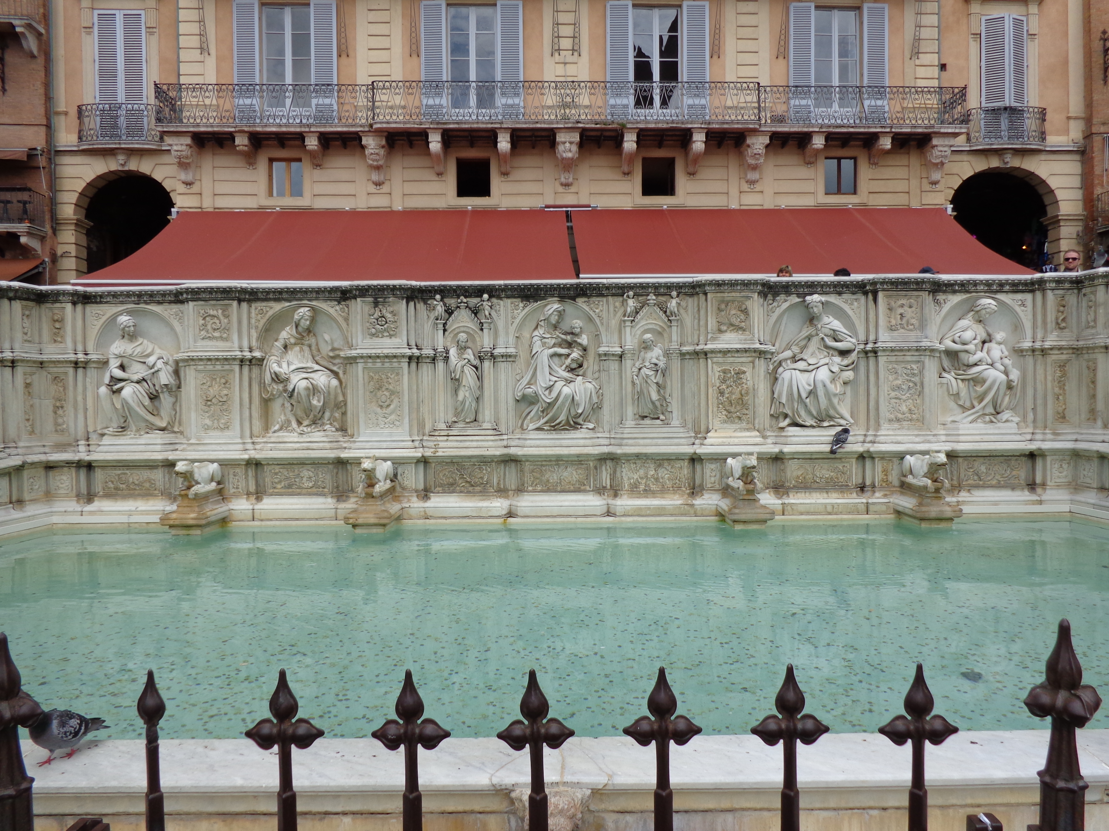 Fonte Gaia, Siena